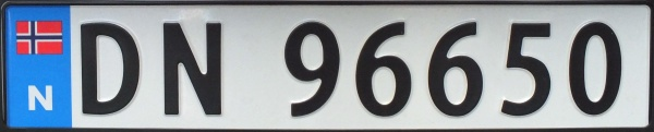 Skilt etter mai 2012, uten oblatmerke